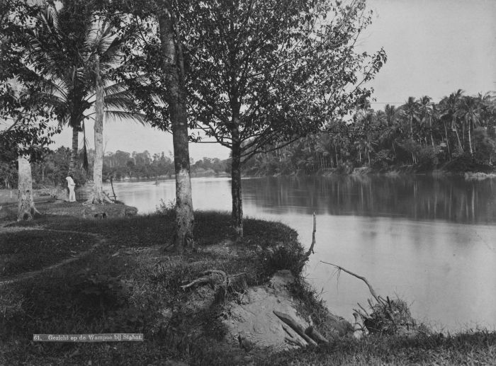 Foto. Gezicht op de Wampoerivier bij Stabat